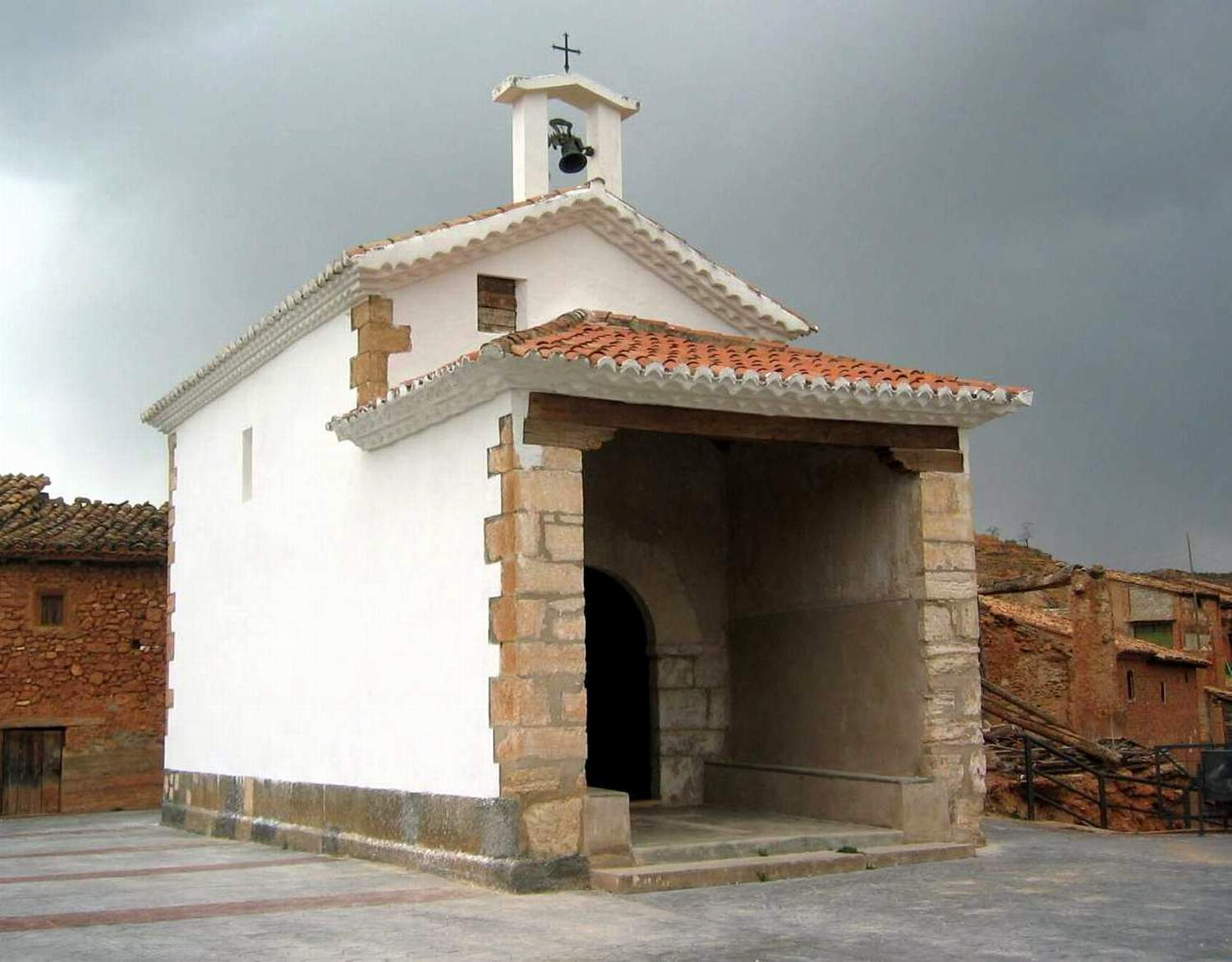 Vista general, fronto-lateral izquierda de la ermita de san Roque, Torrebaja.